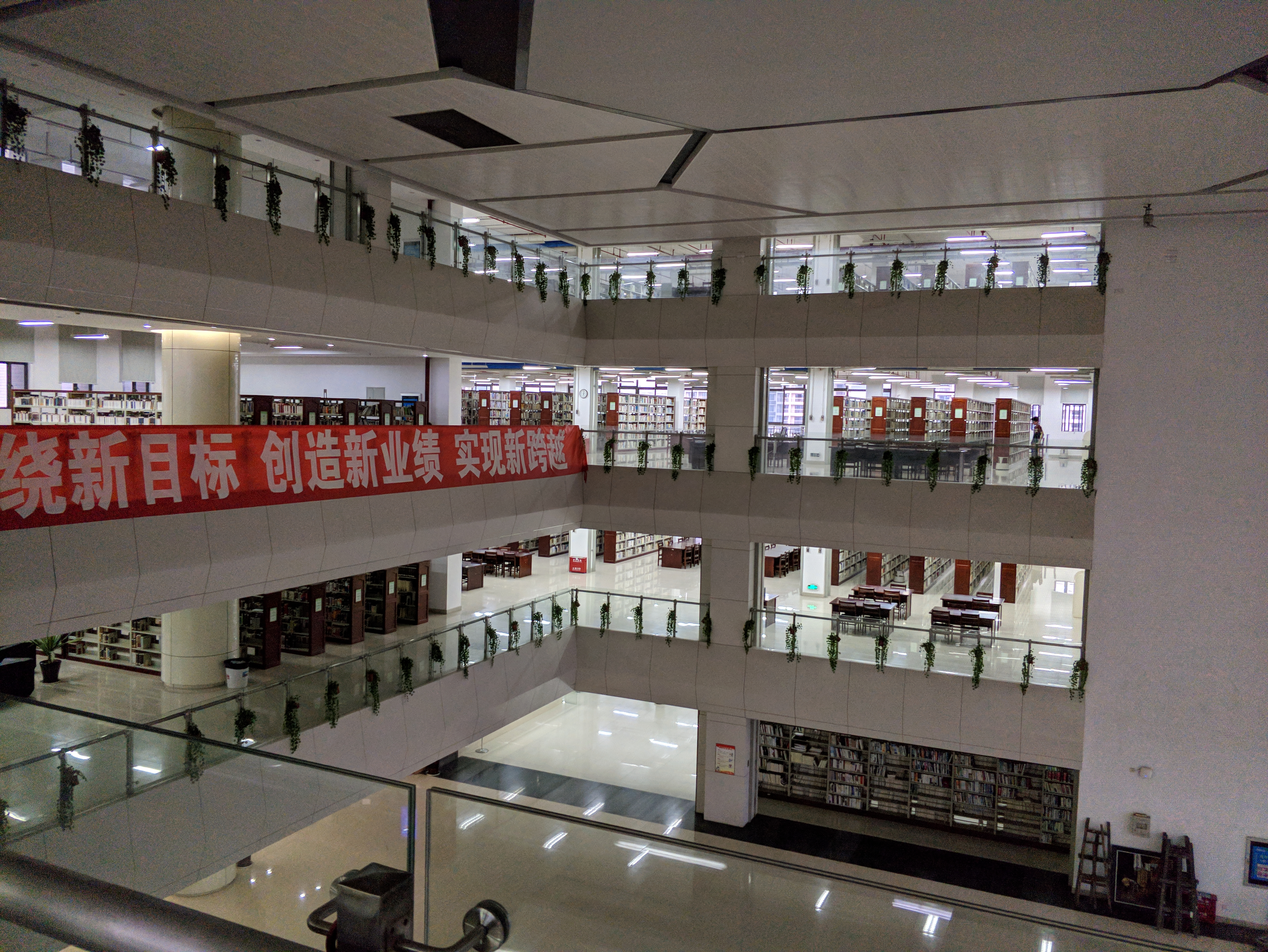 图为广东第二师范学院花都校区图书馆内